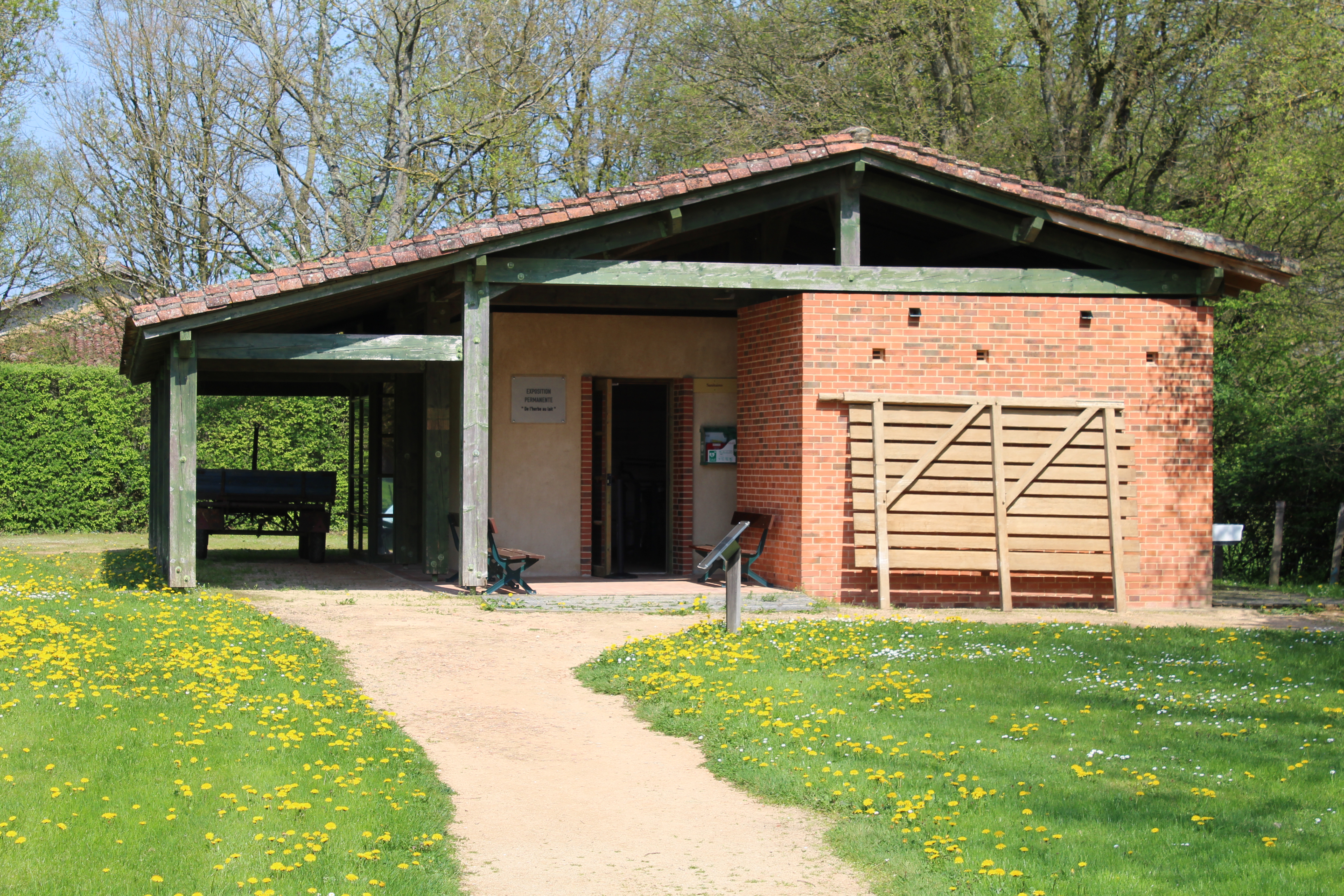 Coopérative laitière du Domaine des Planons, Saint-Cyr-sur-Menthon.